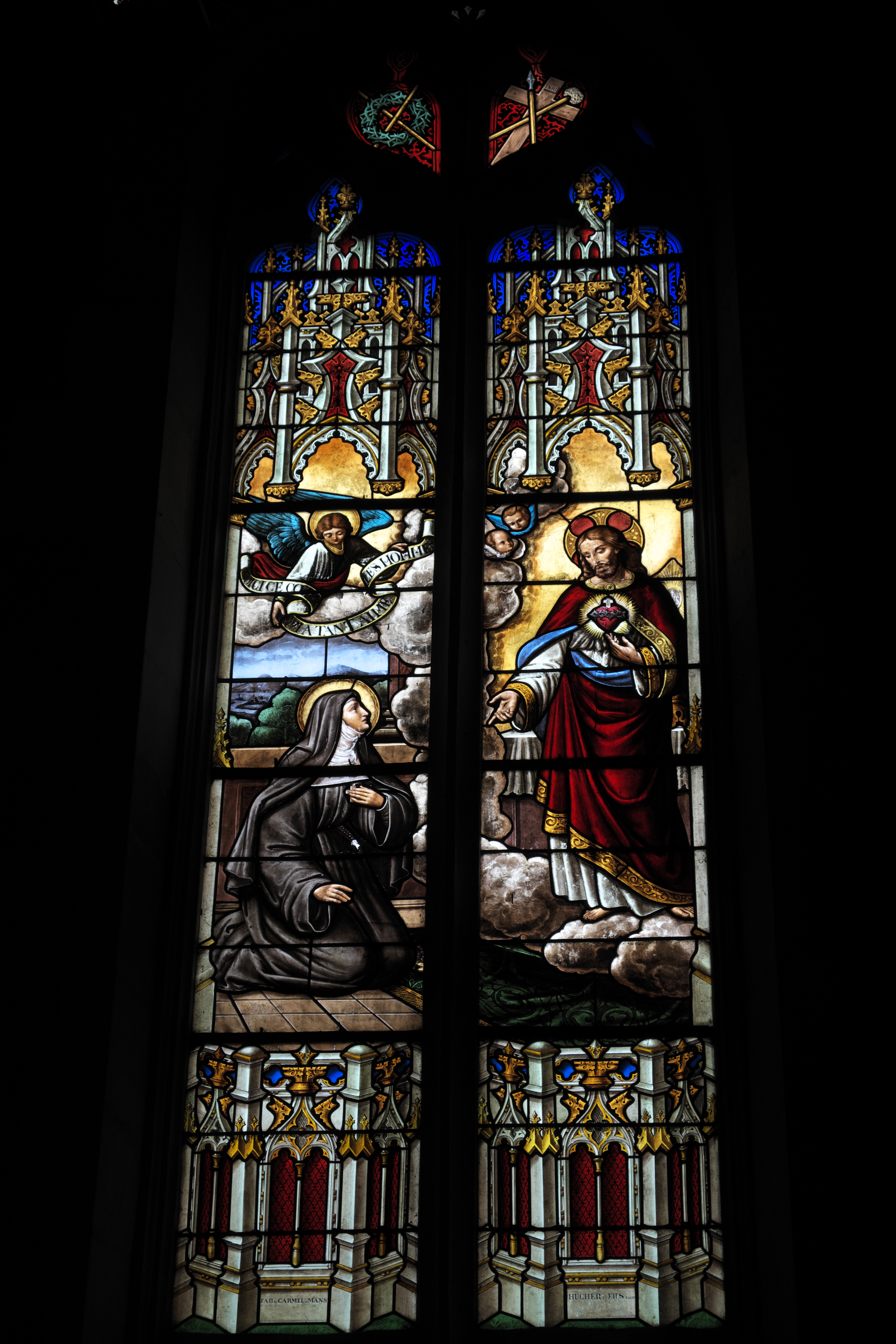 Kirche Notre-Dame in Saint-Calais im Département Sarthe (Pays de la Loire/Frankreich), Bleiglasfenster mit Signatur: FAB. DU CARMEL DU MANS HUCHER ET FILS SUCCR; Darstellung: Erscheinung des Herzen Jesu der Margareta Maria Alacoque